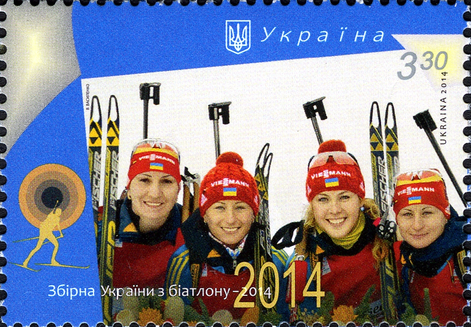 Марка України «Збірна України з біатлону-2014». Золота естафета. 21.02.2014»